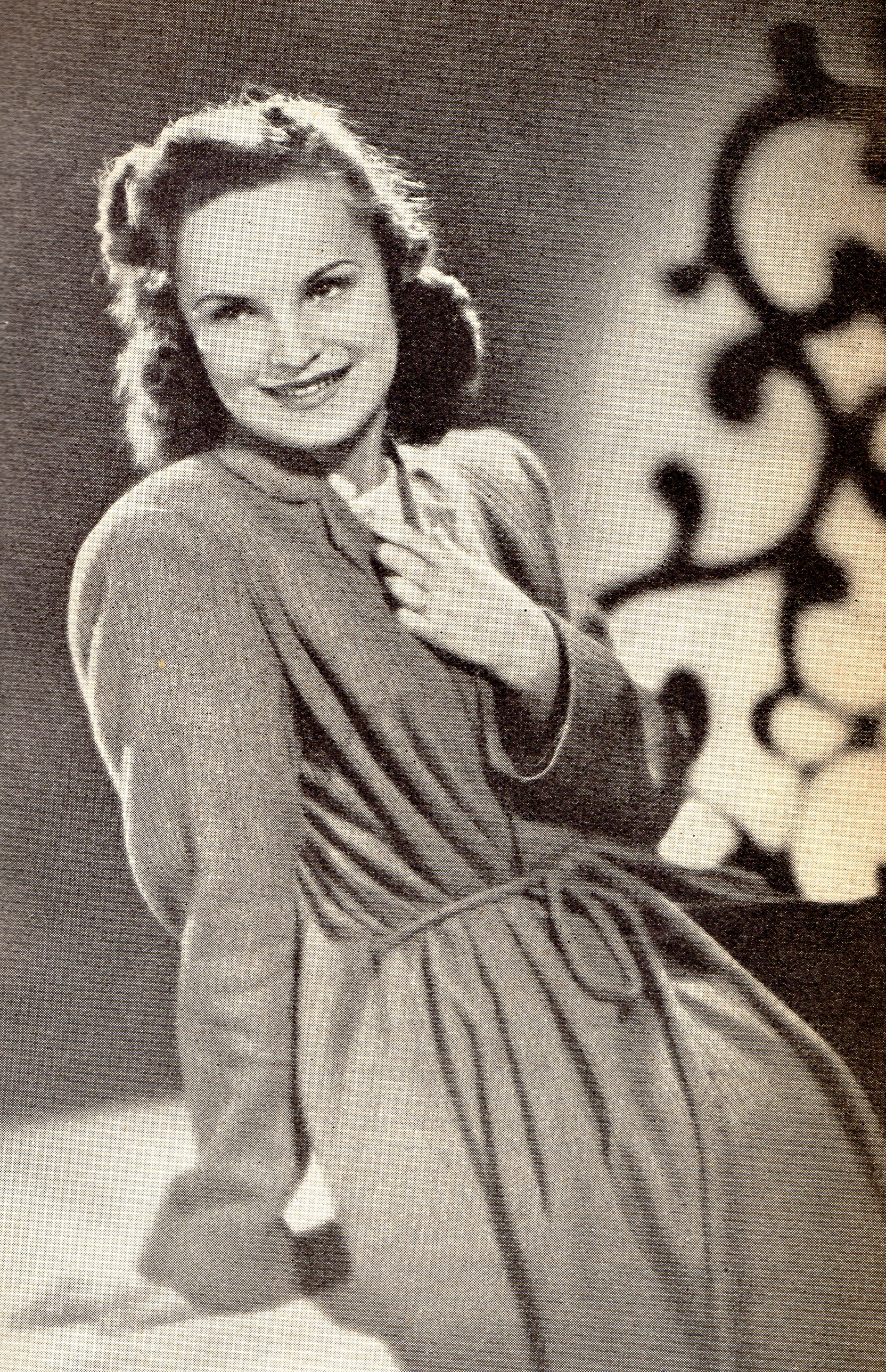 Zdenka Sulanová, 1941 (foto Deml a Hanuš)